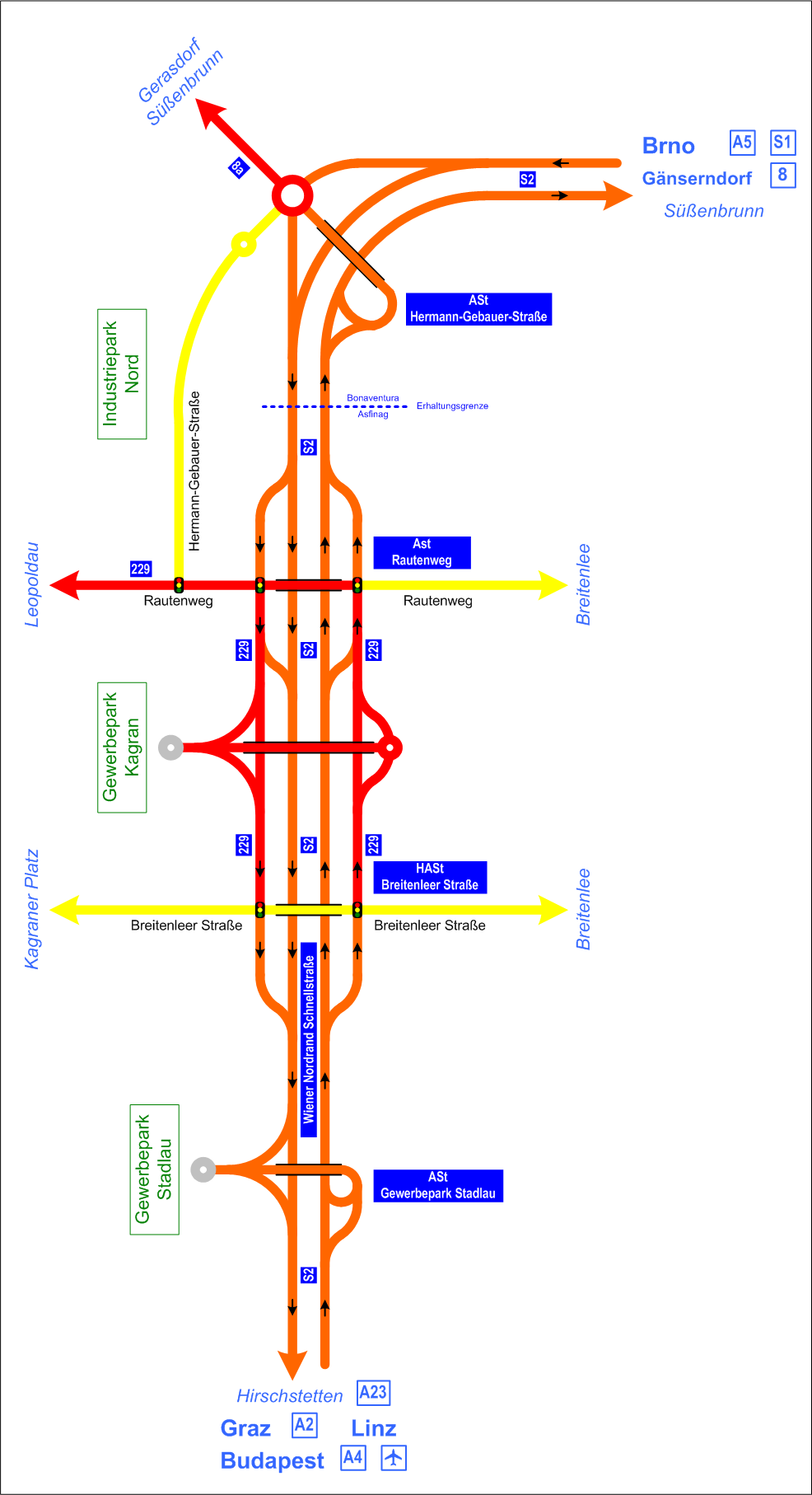 Streckengrafik der Wiener Nordrand Schnellstraße S2. Gültig ab 18. Dezember 2009